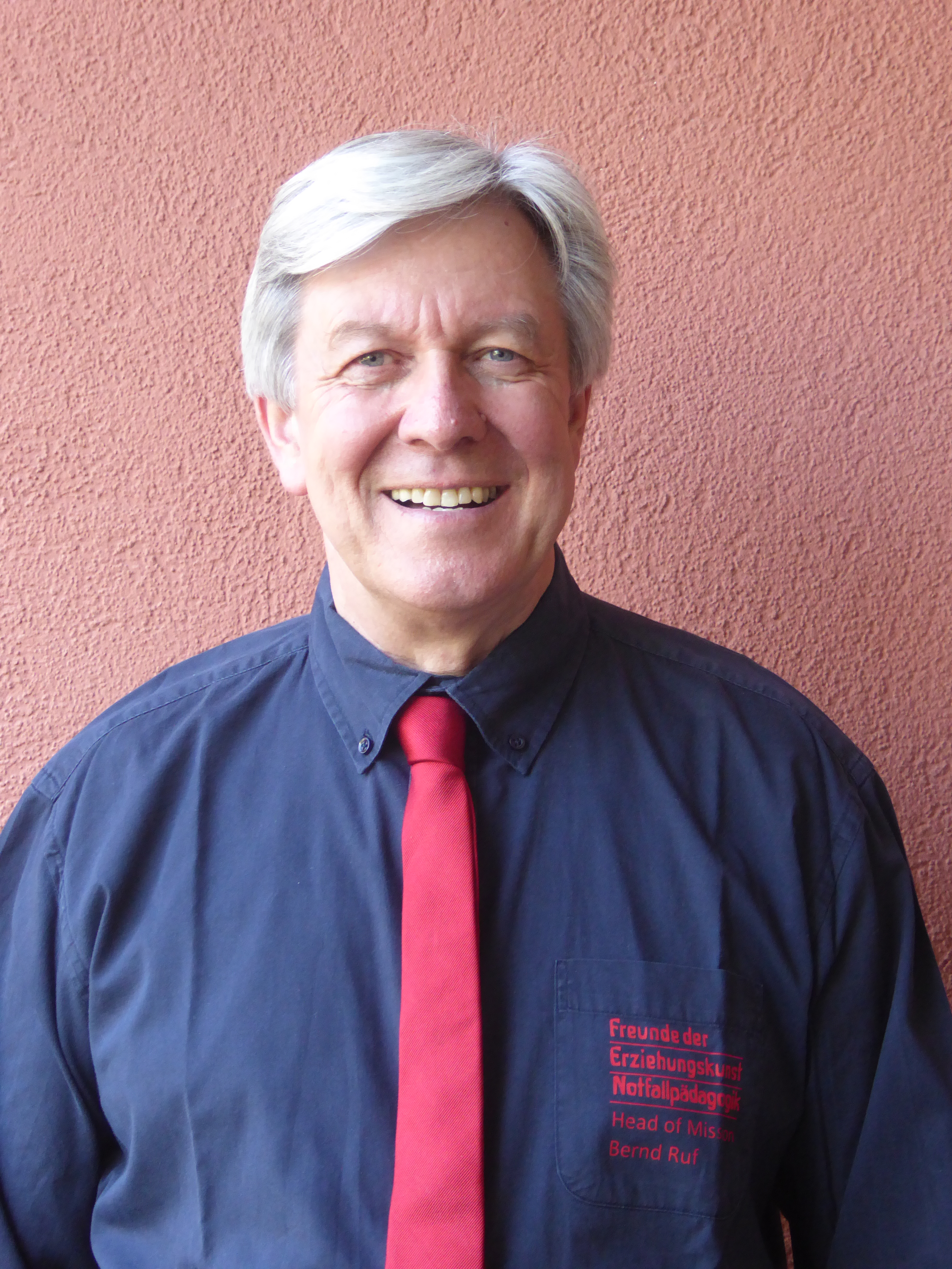 Bernd Ruf Notfallpädagoge. Portrait